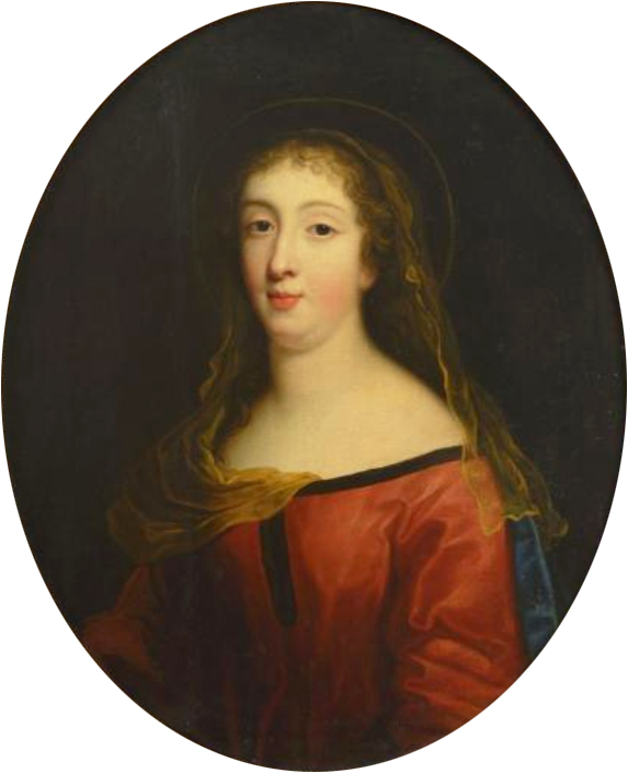 Portrait d'une Vierge, présumé être celui de la Marquise de Ganges, attribué à Pierre Mignard.